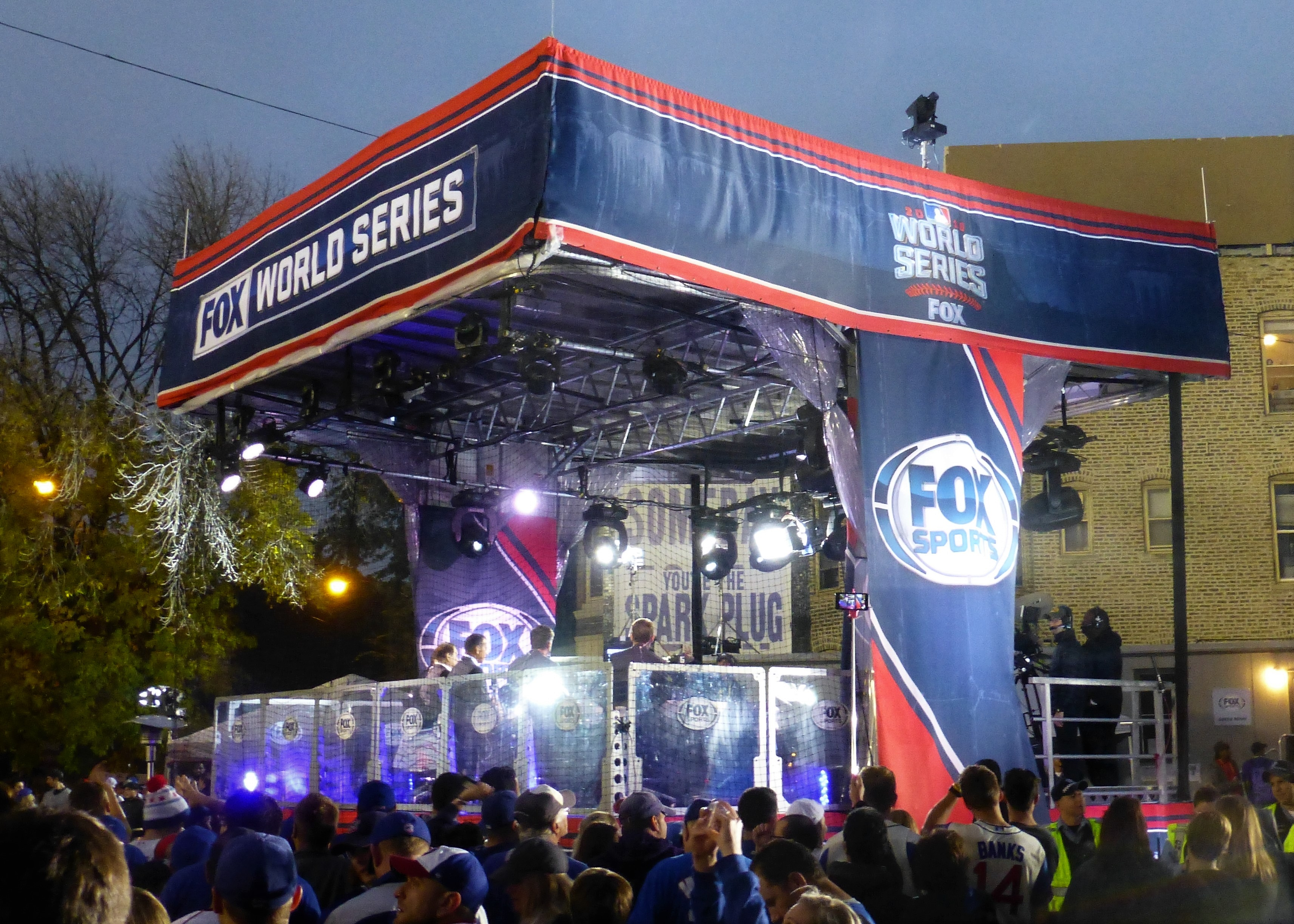 Cubs 028